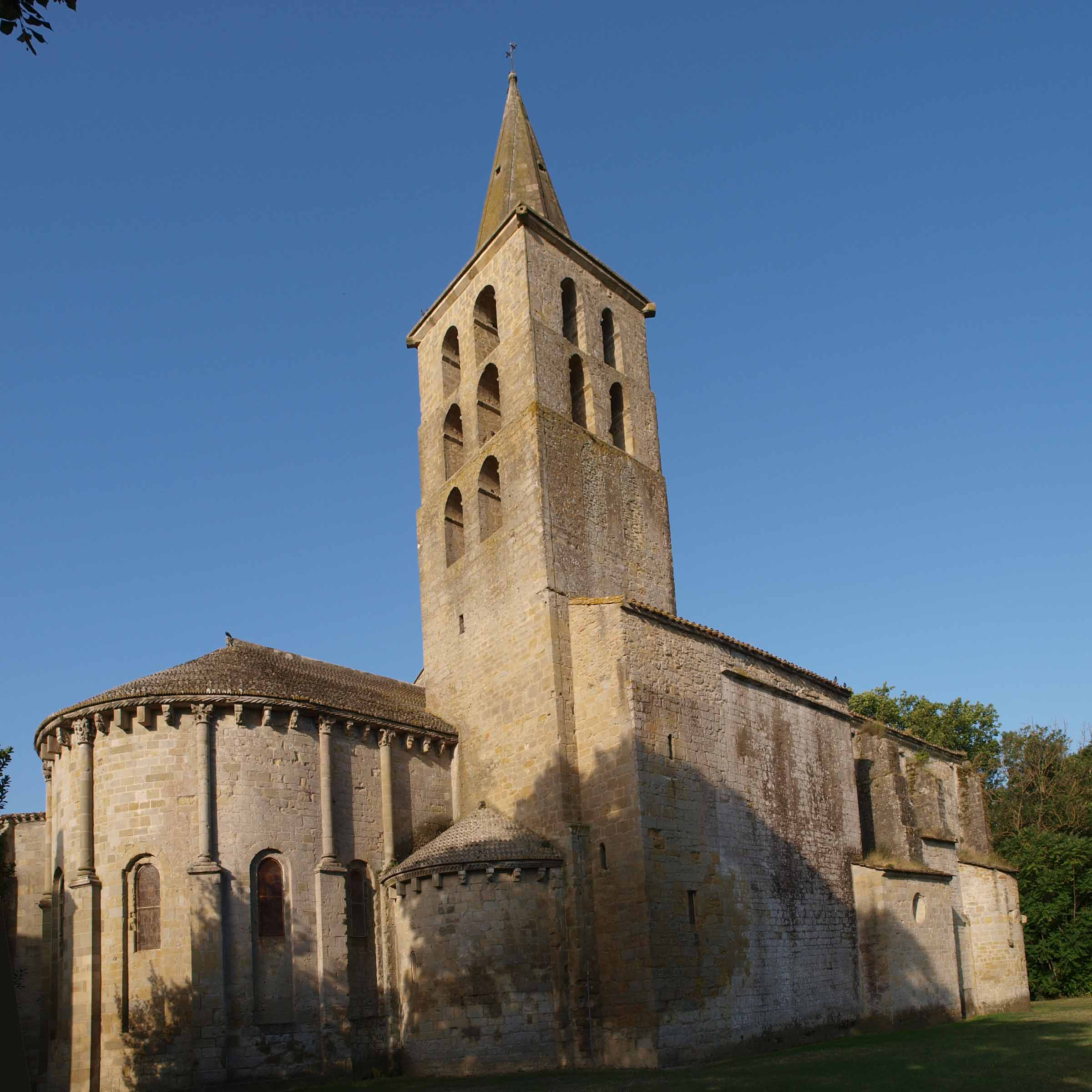 Abbaye de Saint Papoul (Aude)